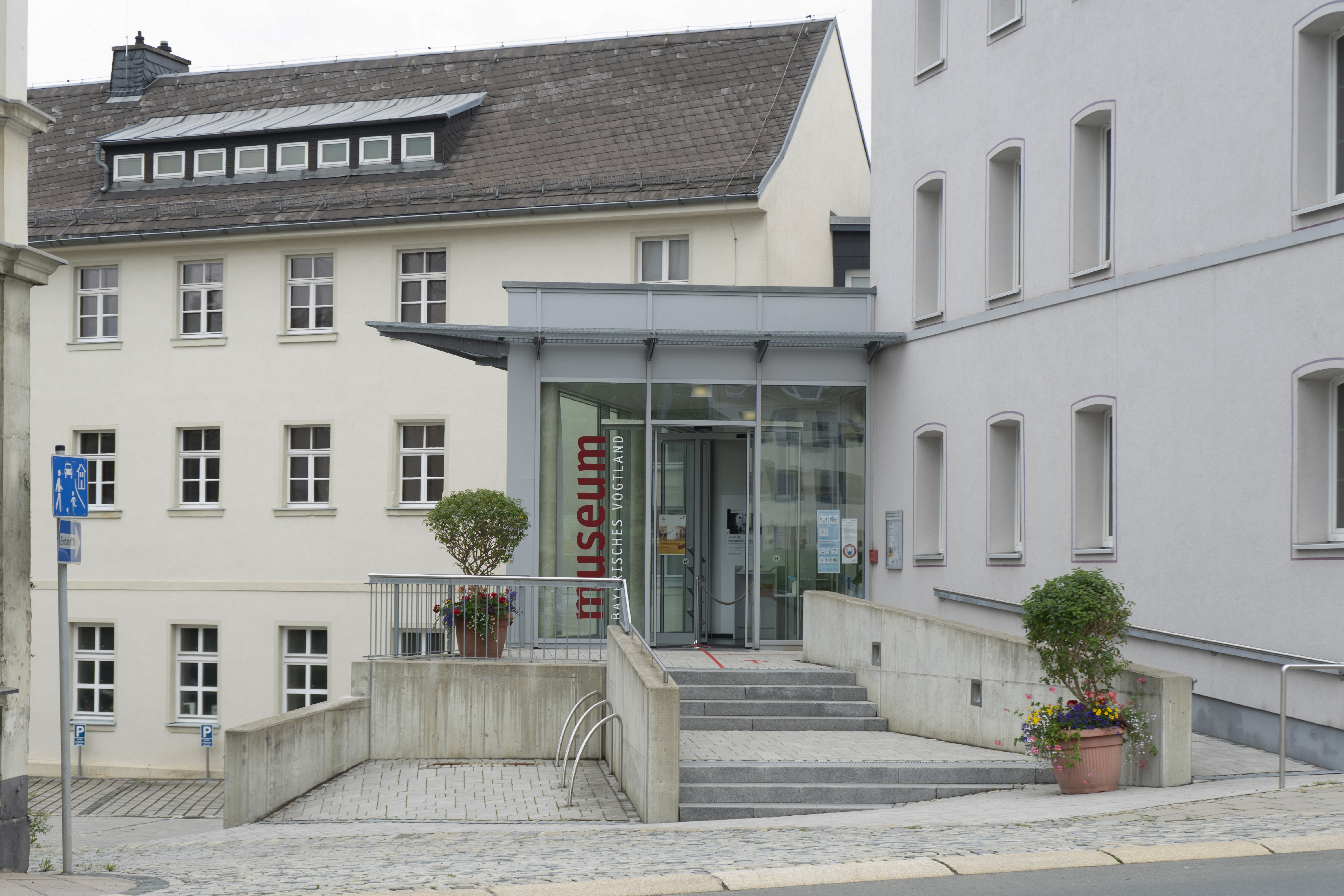 Eingang Museum Bayrisches Vogtland im Juni 2020. Fotografenstandort: 50.323616, 11.918301; heading: 0°Subjektstandort: 50.323863, 11.918295